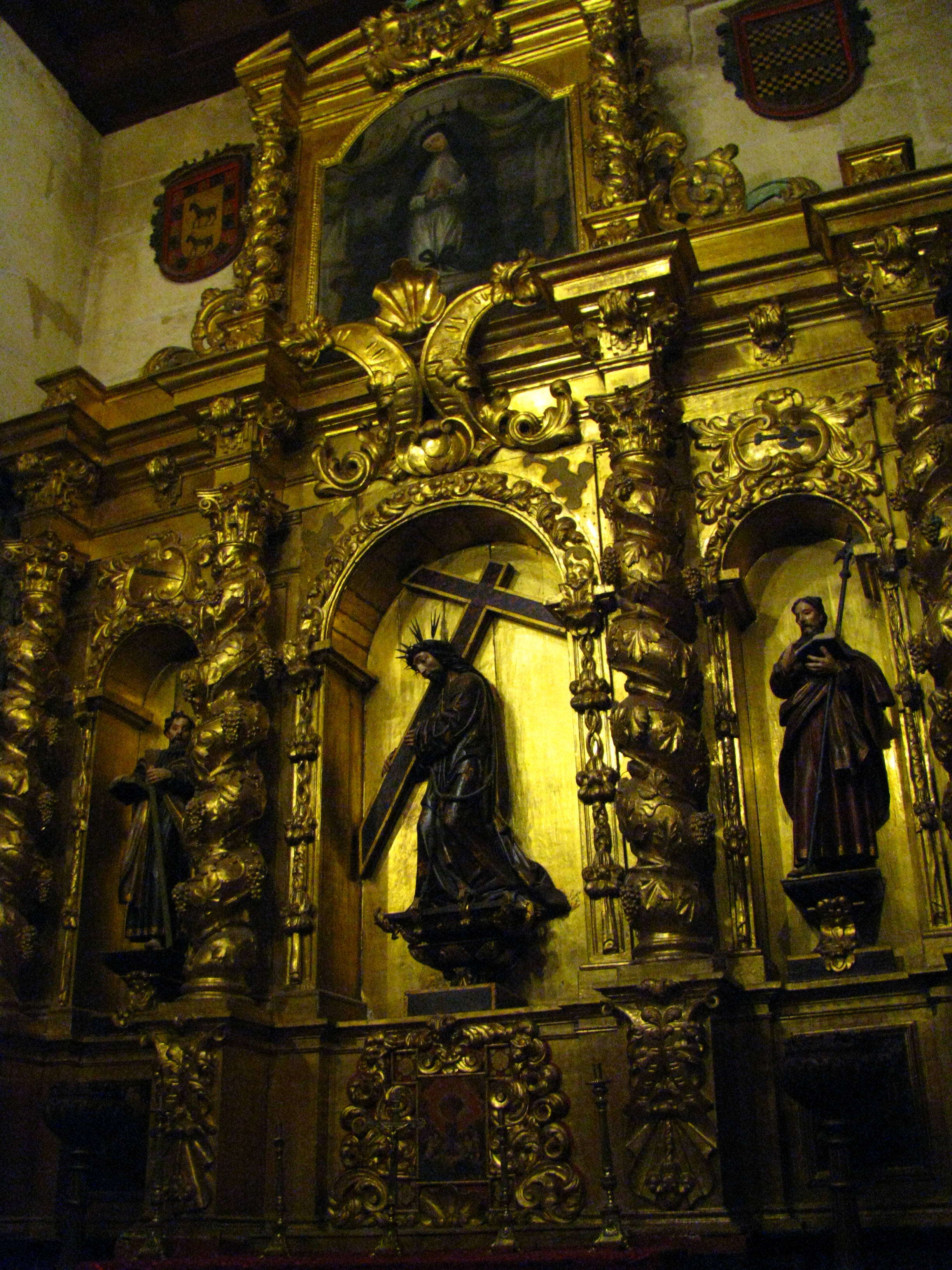 Retablo de la capilla de los Santos Simón y Judas de la Mezquita-catedral de Córdoba.